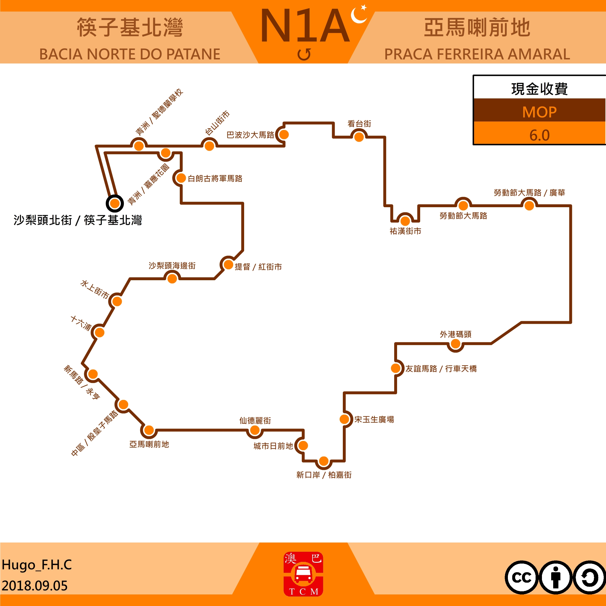 澳門巴士N1A走線圖